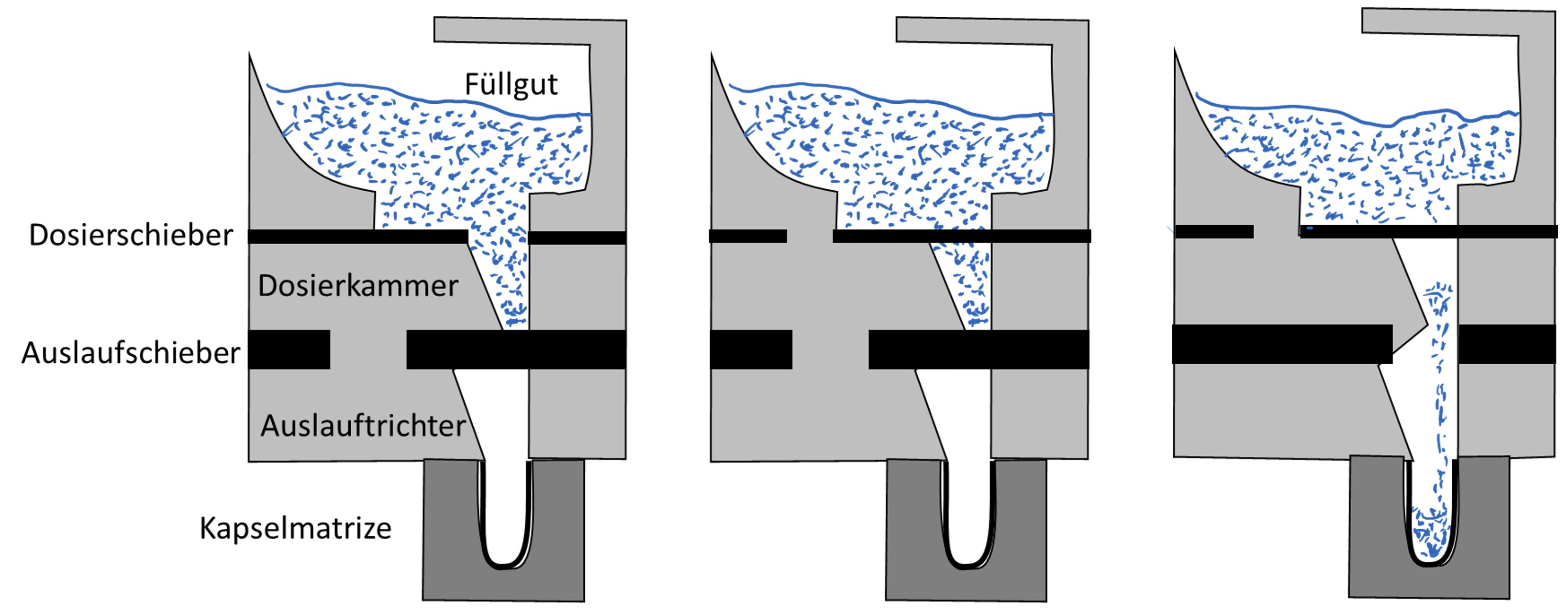 Das Doppelschiebverfahren ist ein Dosierungsverfahren in der Pharmazeutischen Industrie, um Kapseln zu befüllen.